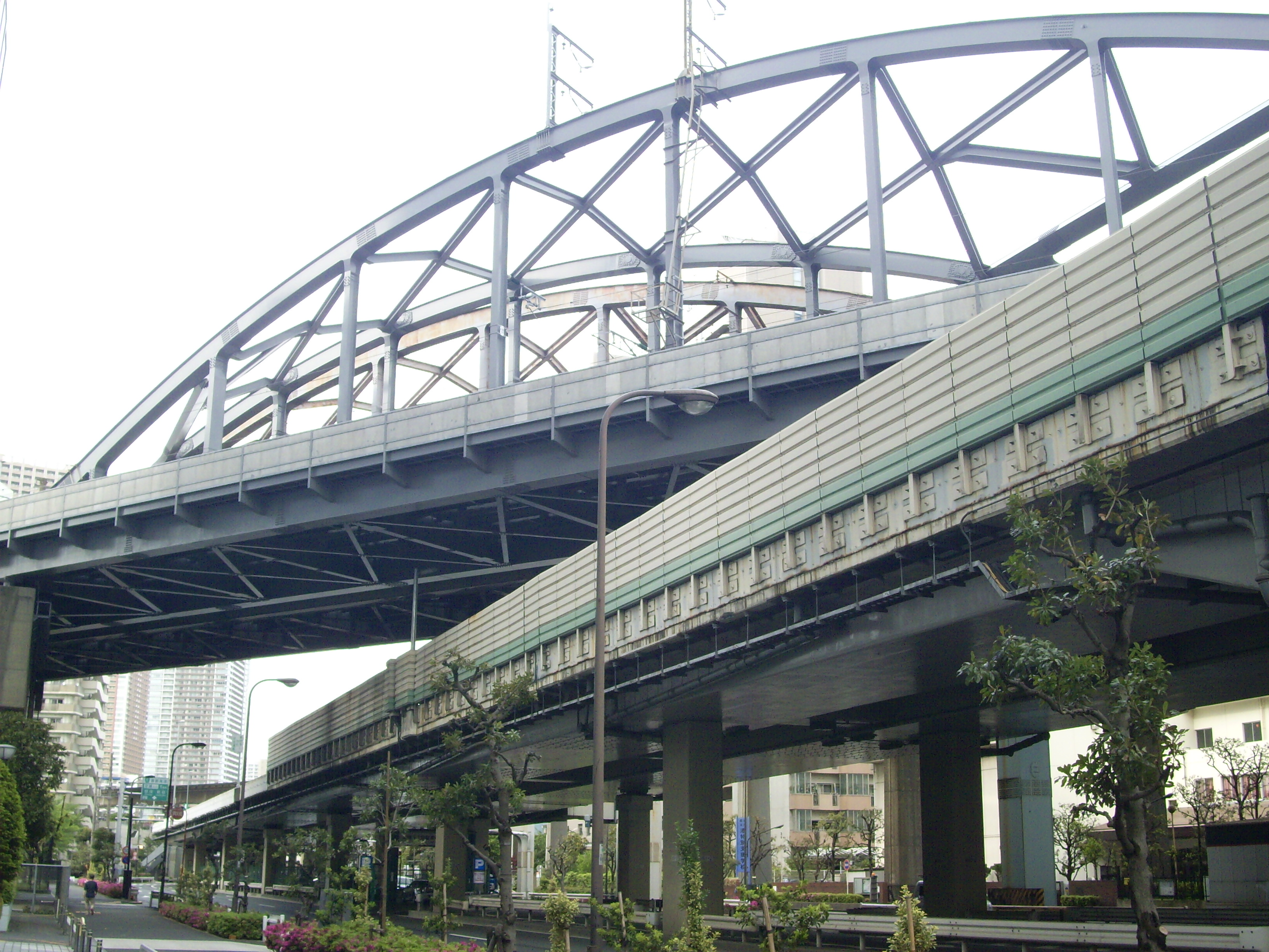 東海道新幹線大井車両基地引き込み線：首都高速1号線を越える跨道橋（ローゼ式橋） ㊟カメラを起動すると日付機能が出荷時のものに初期化されるため、ファイル履歴の撮影日時とメタデータの原画像データの生成日時が異なります